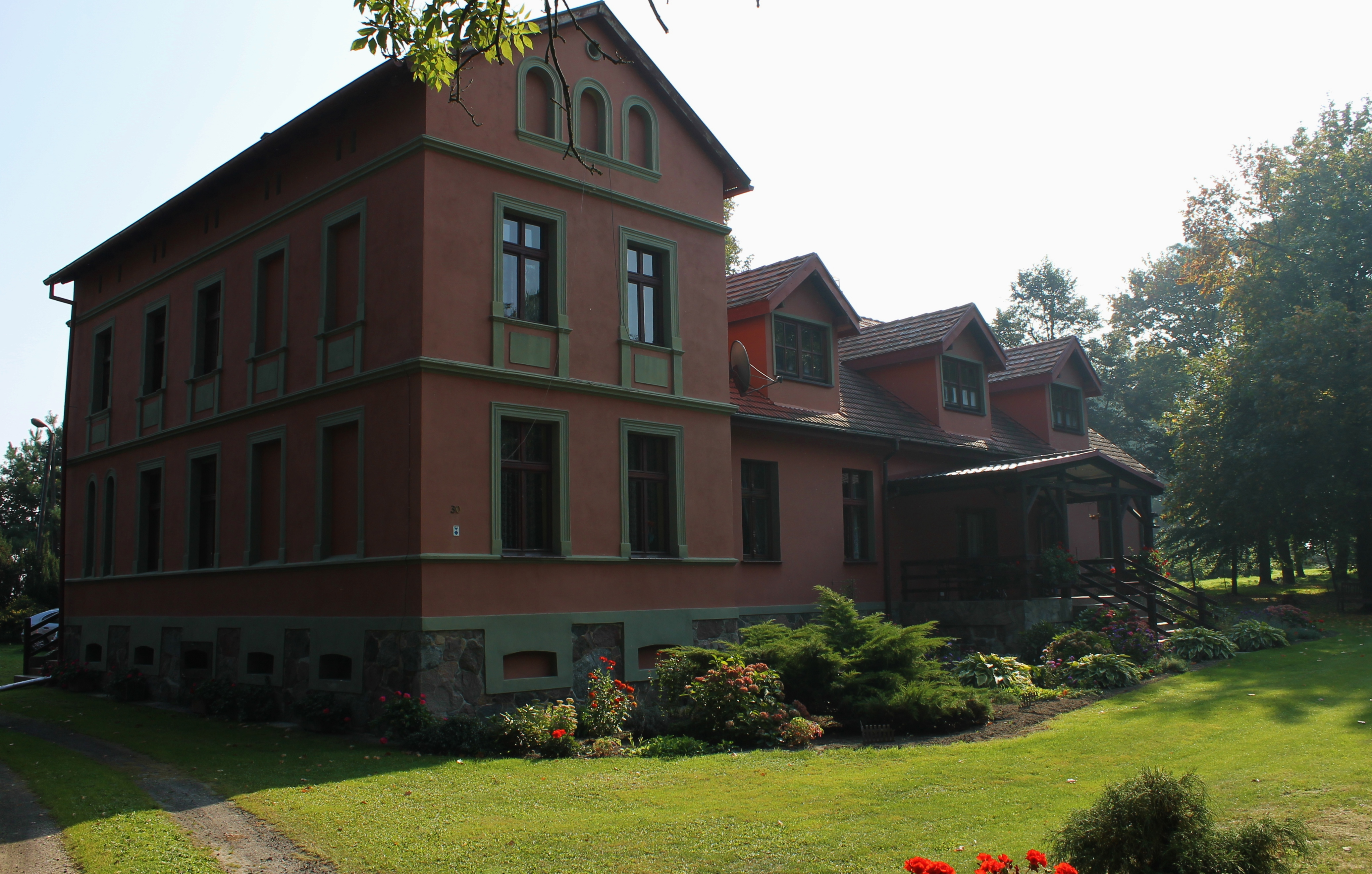 Broniewo, dwór, XIX, 1905